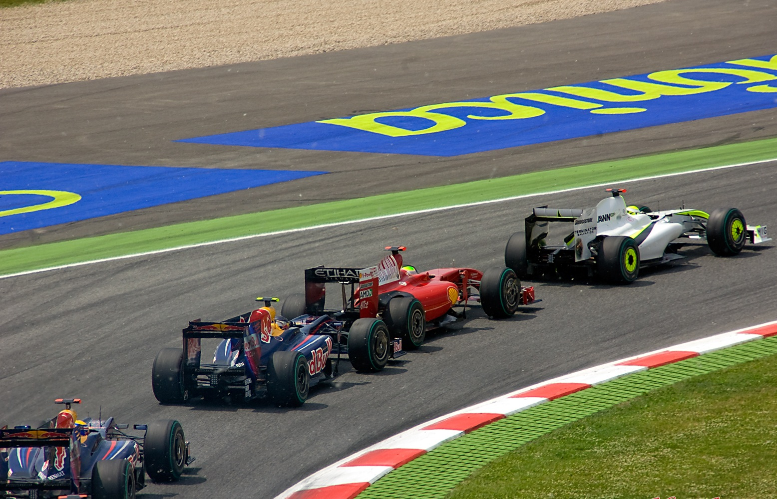 Nikon D40 + Sigma 18-200 DC OS HSM 1/500s - F/14 - 200mm - ISO400